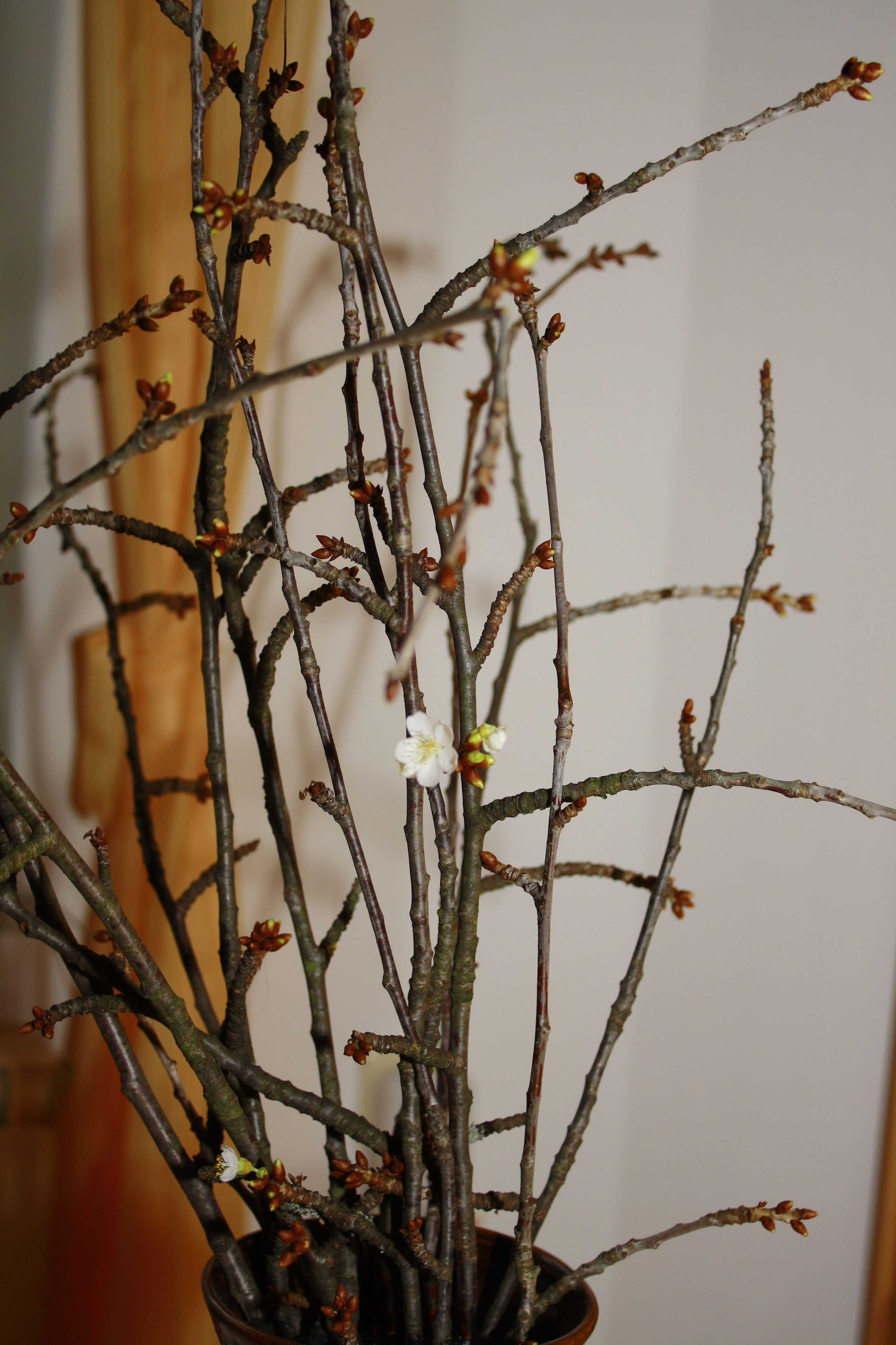 Barbarazweig blühend am Weihnachtsabend in Austria